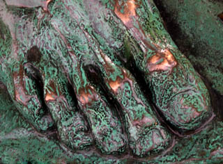 Alterungs-Patina an Bronze